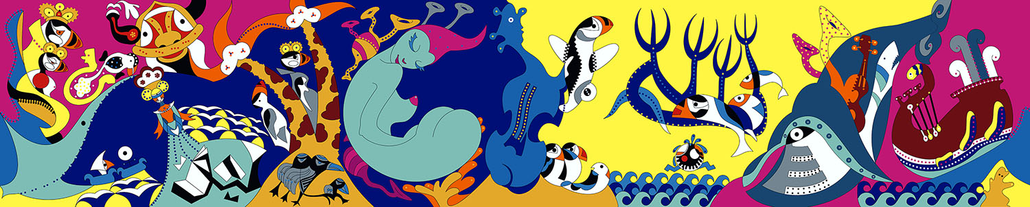 Afbeelding toyisme kunstwerk "De legende van Uppspretta"